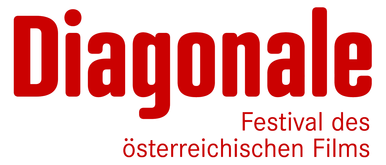 Logo Diagonale (Filmfestival)